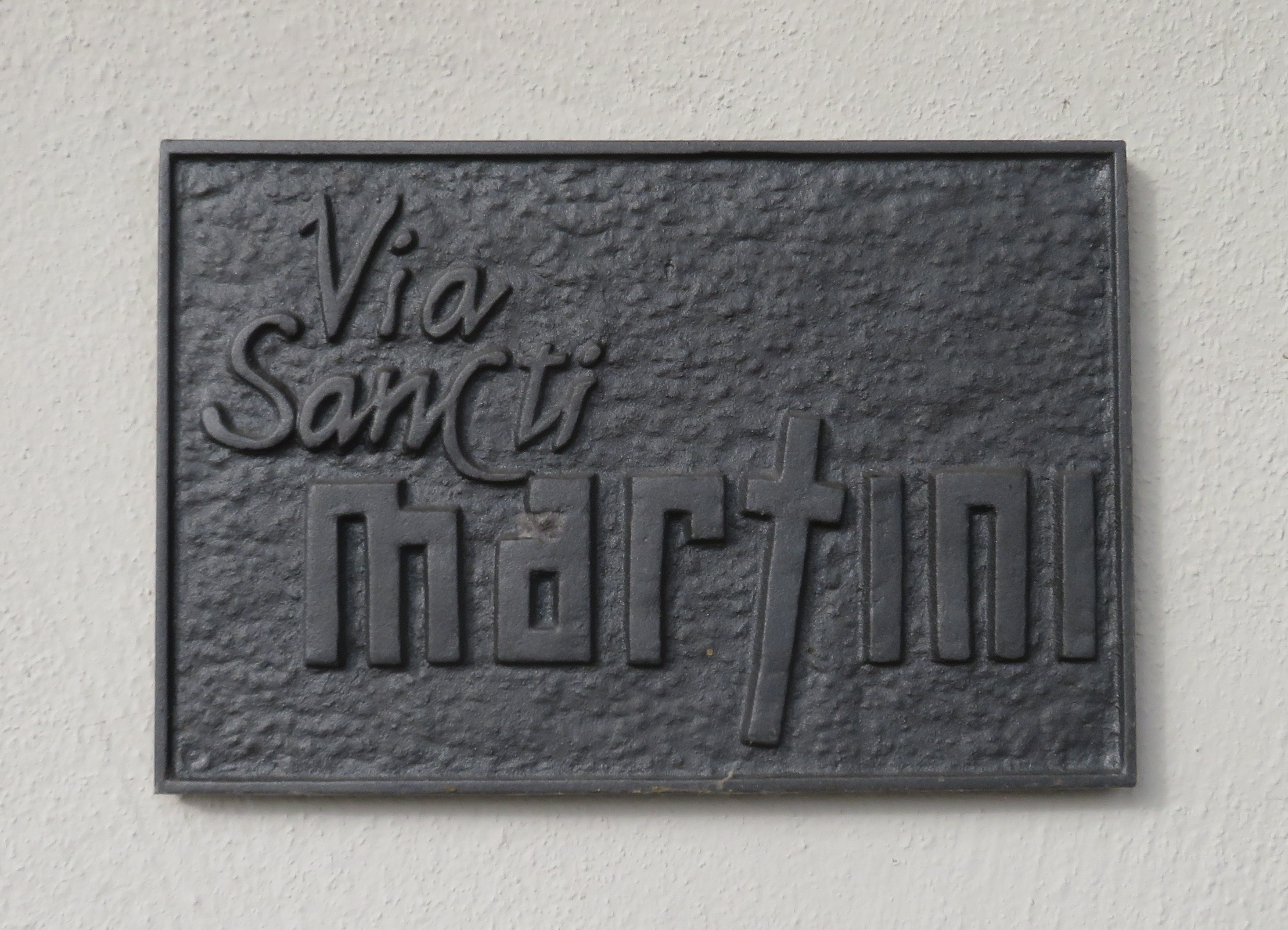 Hinweistafel auf den Pilgerweg Martinusweg an der Südwand der kath. Pfarrkirche St. Martin (Unterkirchberg)